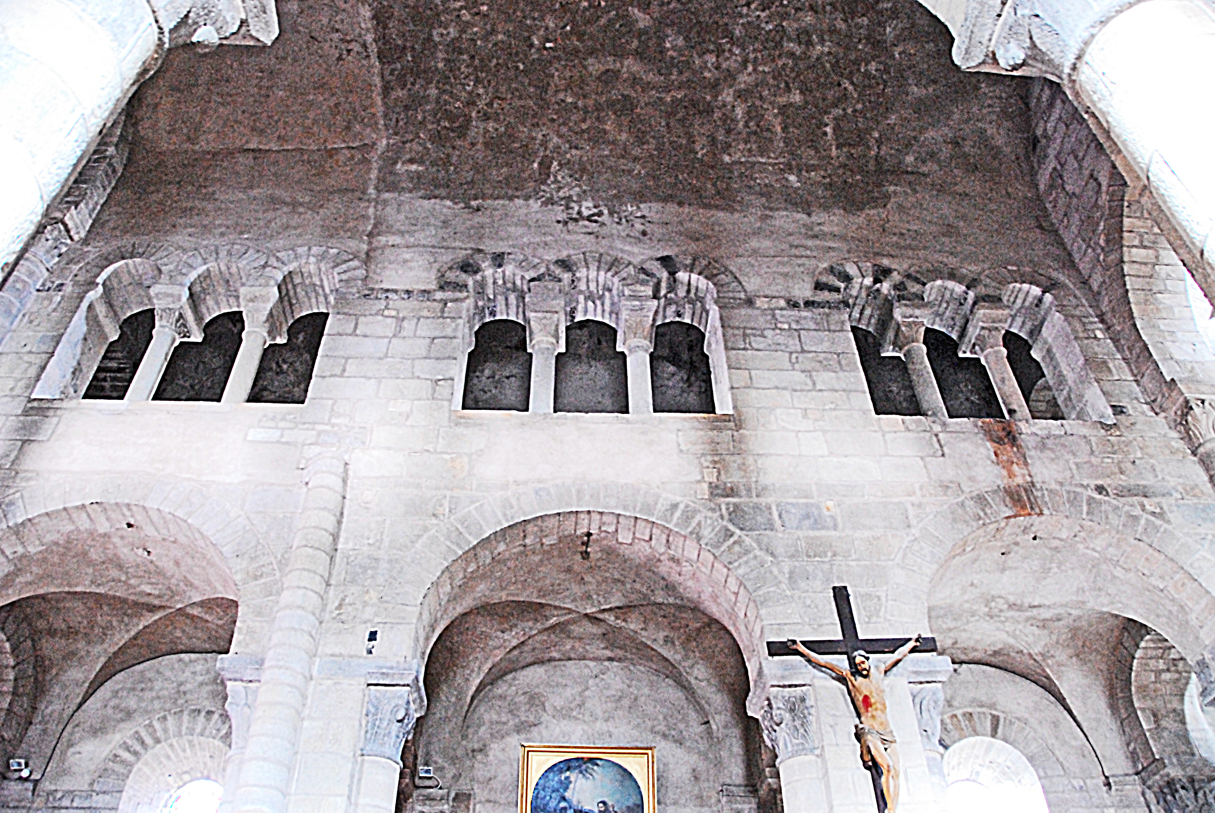 St-Saturnin Puy-de-Dôme), Mittelschif, Nordwand, Joche 2-4